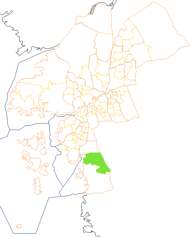 Karta som visar primärområdes belägenhet i Göteborg